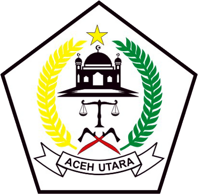 Lambang Kabupaten Aceh Utara, Aceh, Indonesia